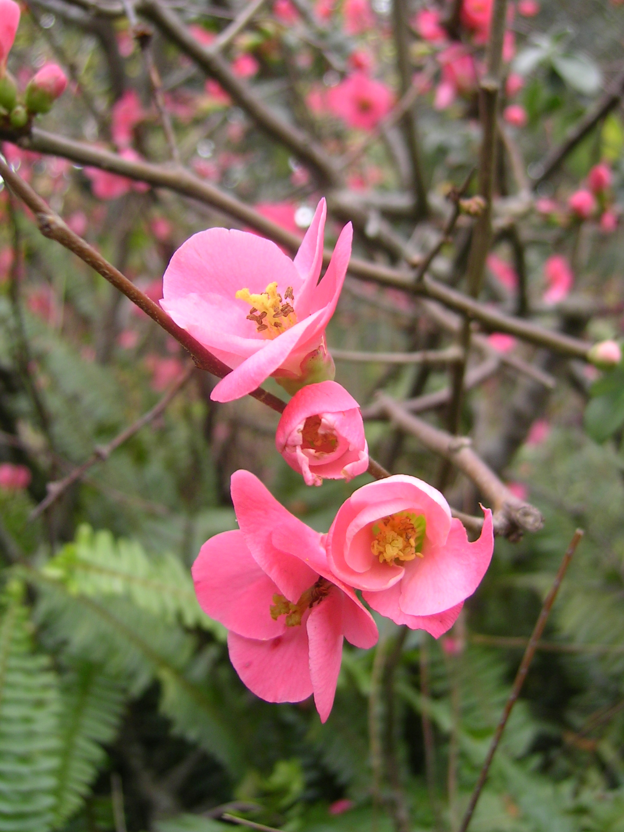 Chaenomeles speciosa, membrillero japonés, Rosaceae, plantas de flor, en Jardì Botánic de Caixa de Girona-Cap Roig